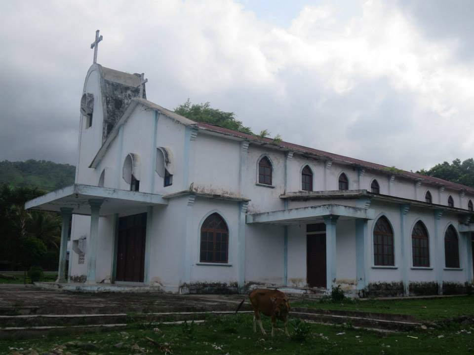 Acanuno